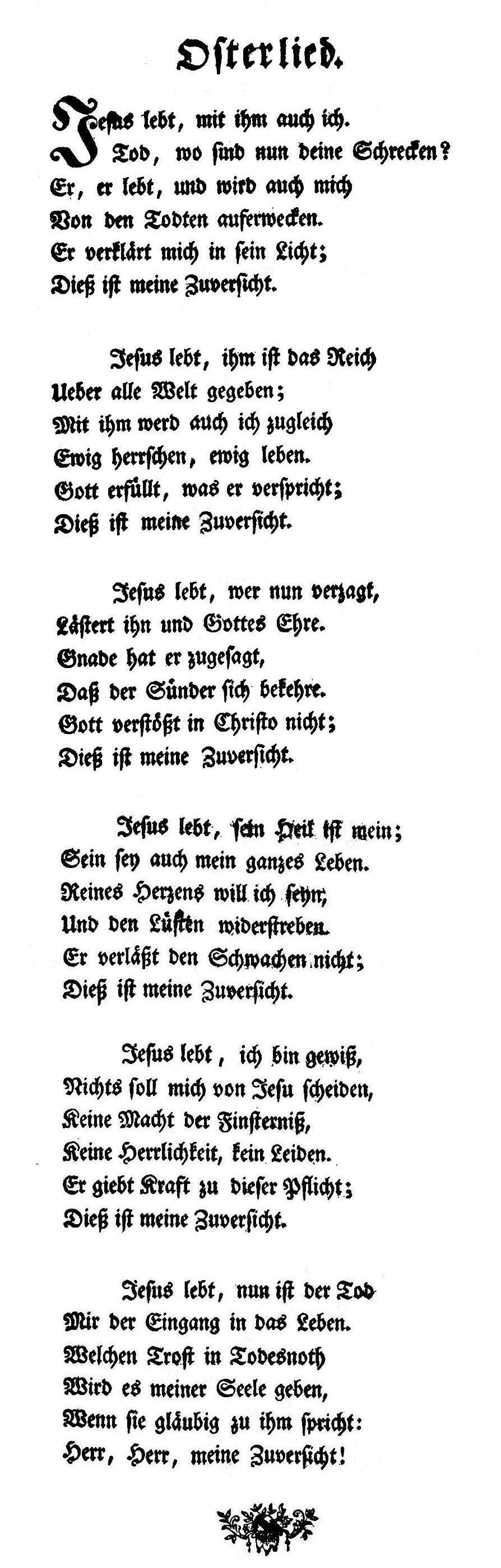 Christian Fürchtegott Gellert: Jesus lebt, mit ihm auch ich. Geistliche Oden und Lieder. in der Weidmannischen Handlung, Leipzig 1757, Seiten 147-148